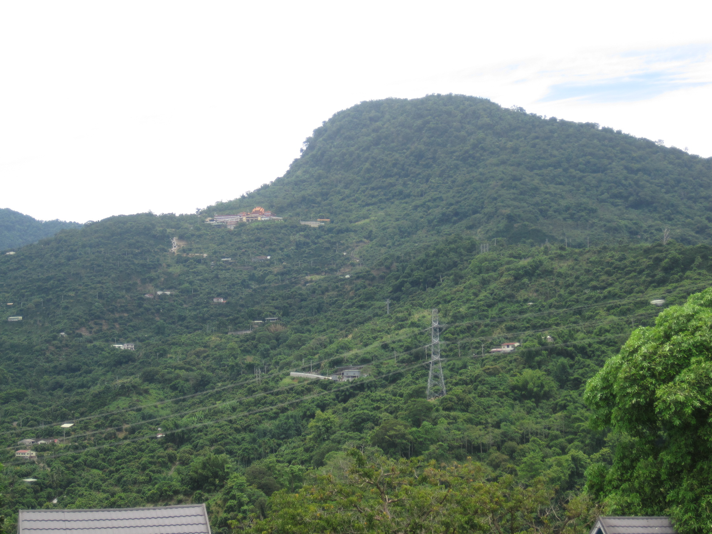 從臺南市東山區的仙湖農場拍攝的崁頭山。